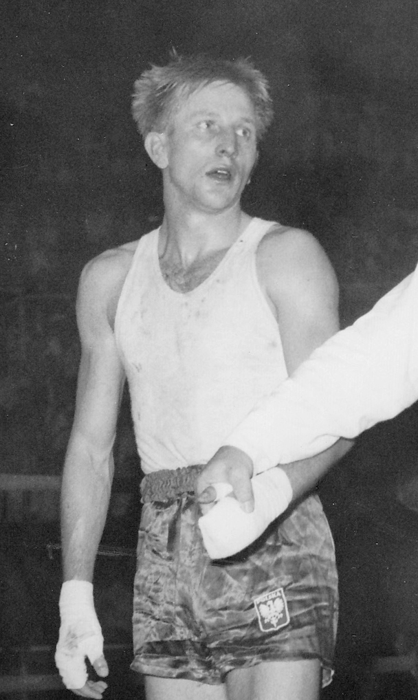 Jerzy Adamski, 1960 Olympics